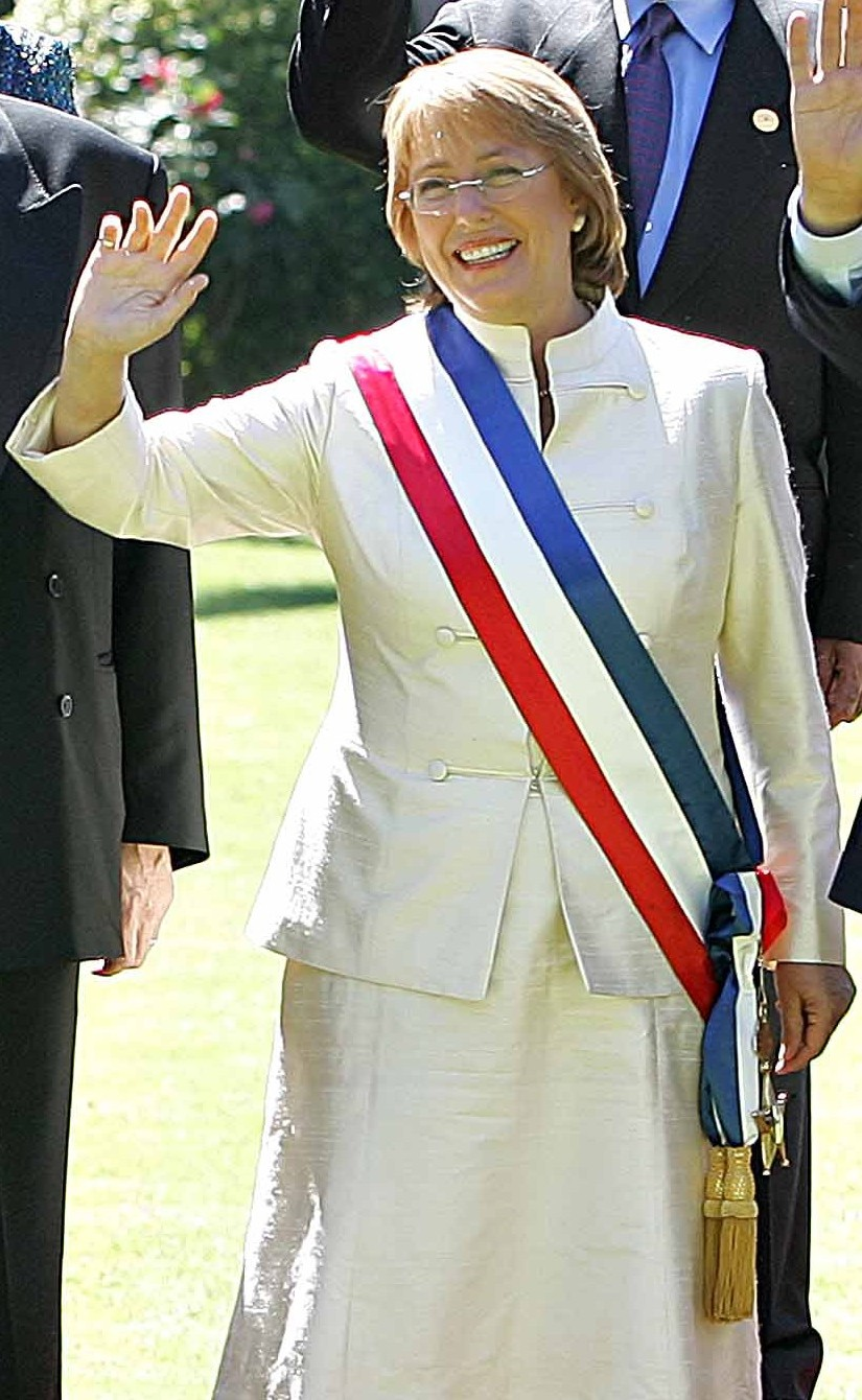 Veronica Michelle Bachelet